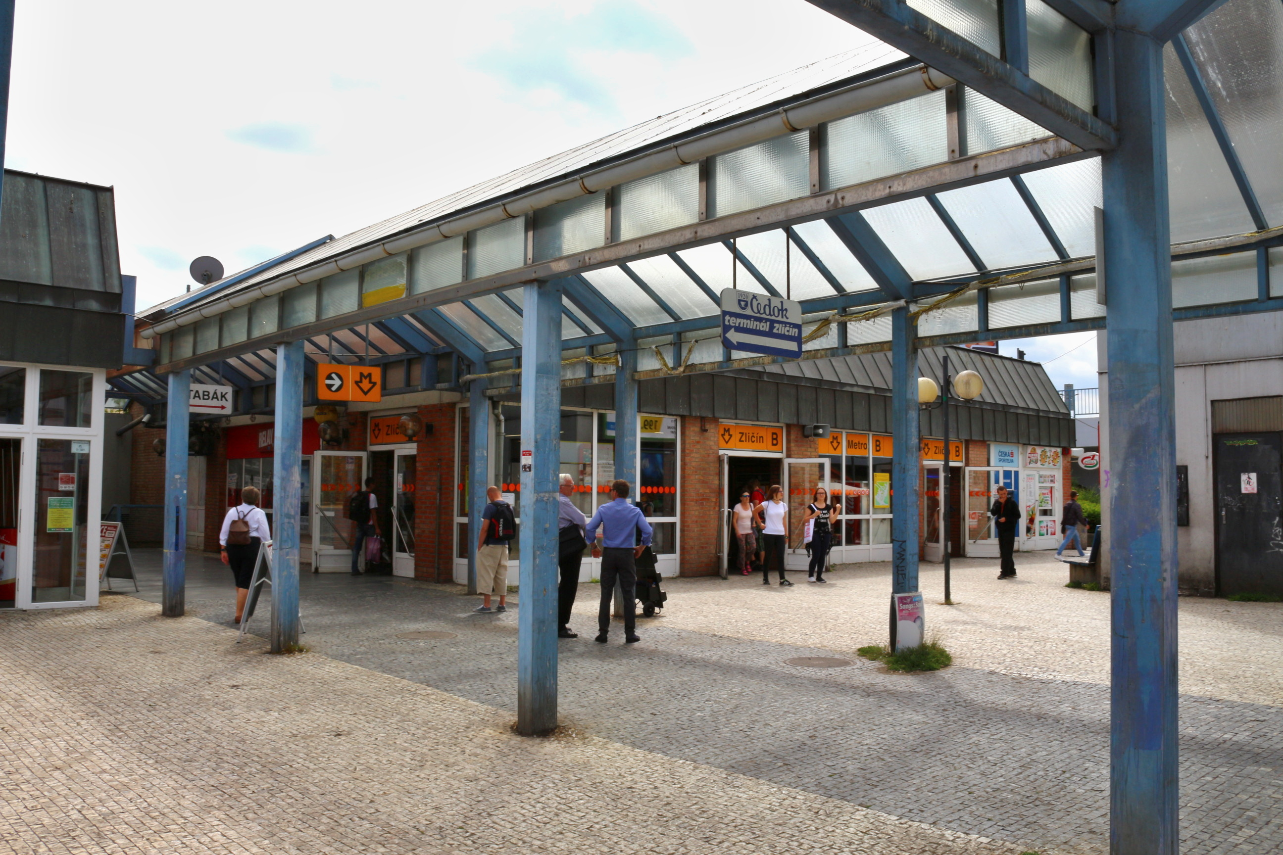 Zličín